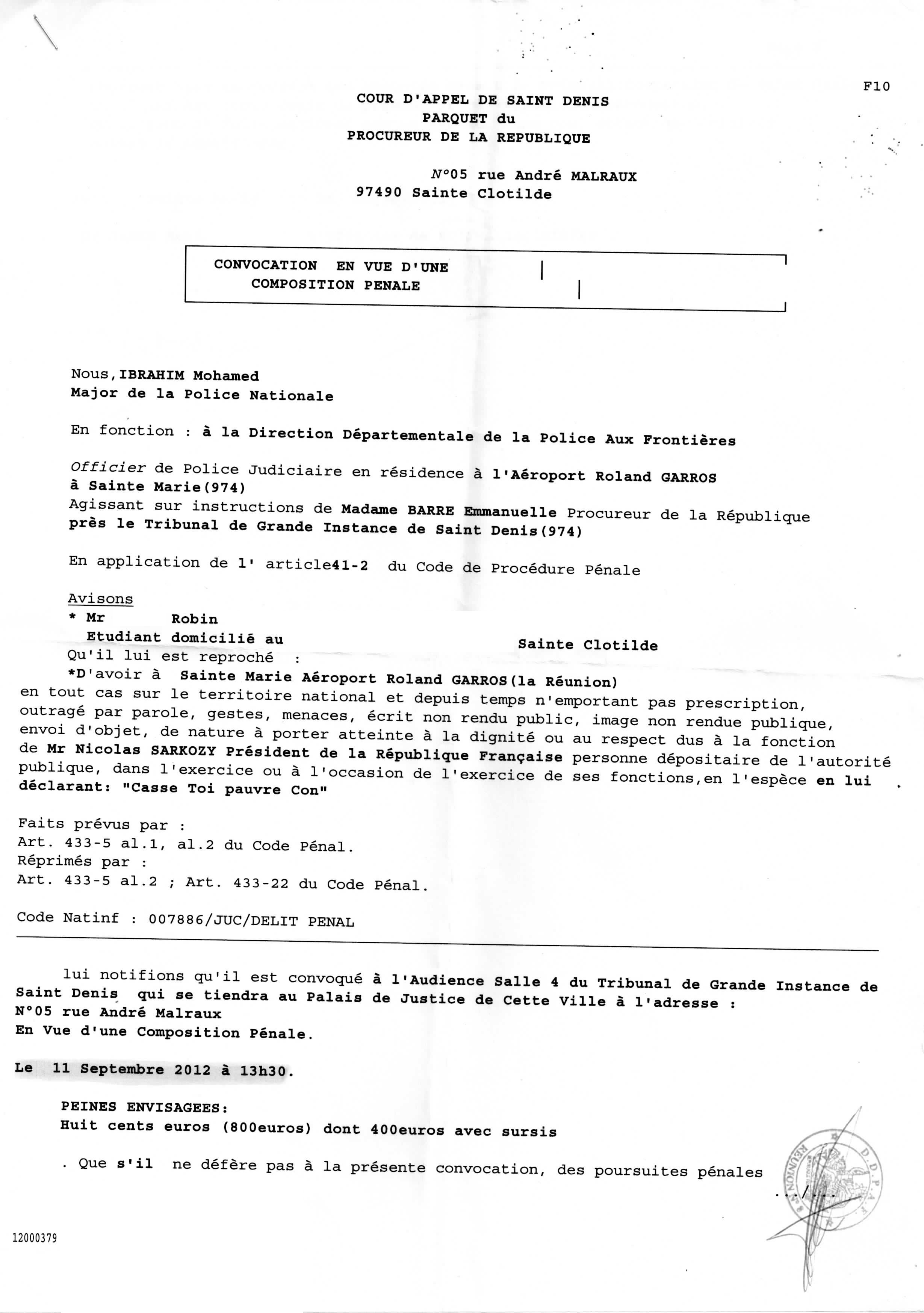 Convocation composition pénale (800€ d'amende dont 400 avec sursis) pour outrage au Président de la République. Cour d'Appel de Saint Denis, La Réunion (974).